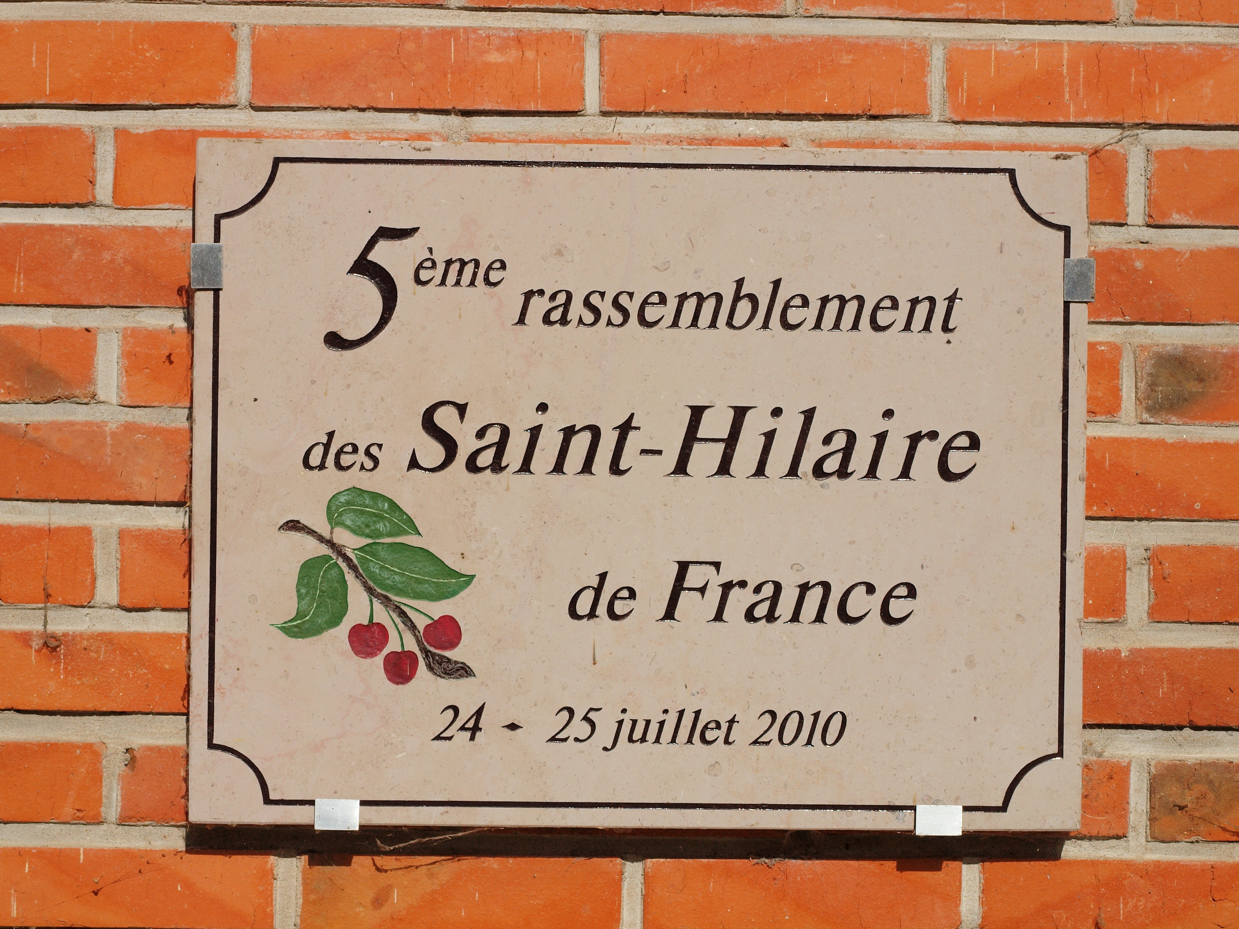 Mairie de Saint-Hilaire-Saint-Mesmin (Loiret, France)